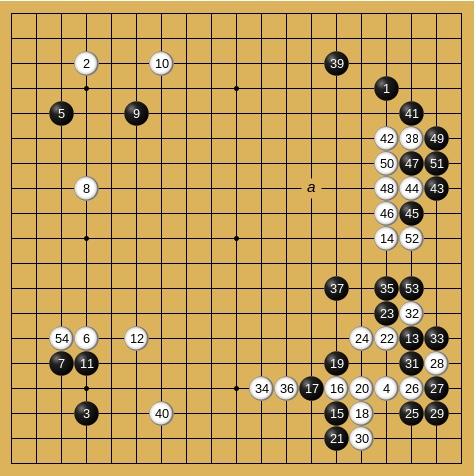 第4期棋聖戦第5局